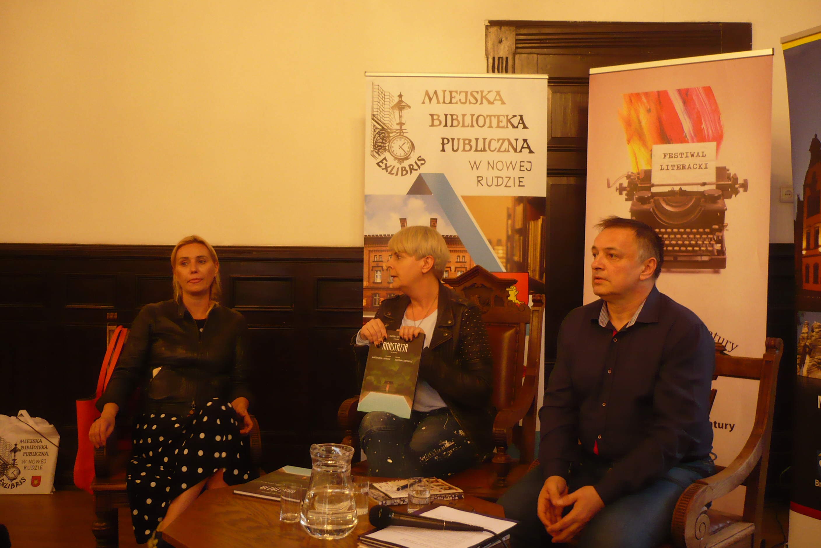 Wojciech Birek, Festiwal Góry Literatury, 2018